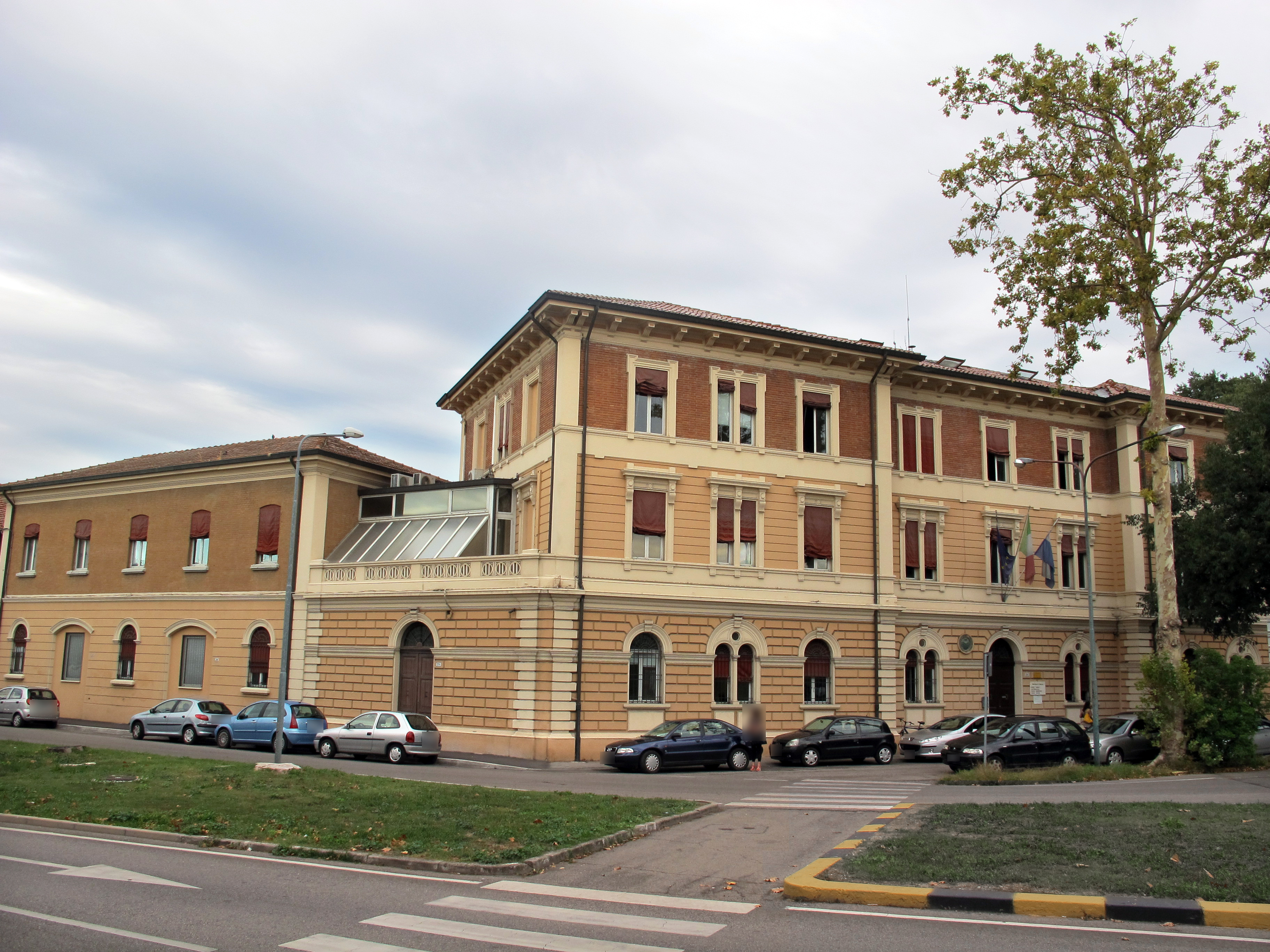 Caserma Pastrengo - MIBAC This is a photo of a monument which is part of cultural heritage of Italy.